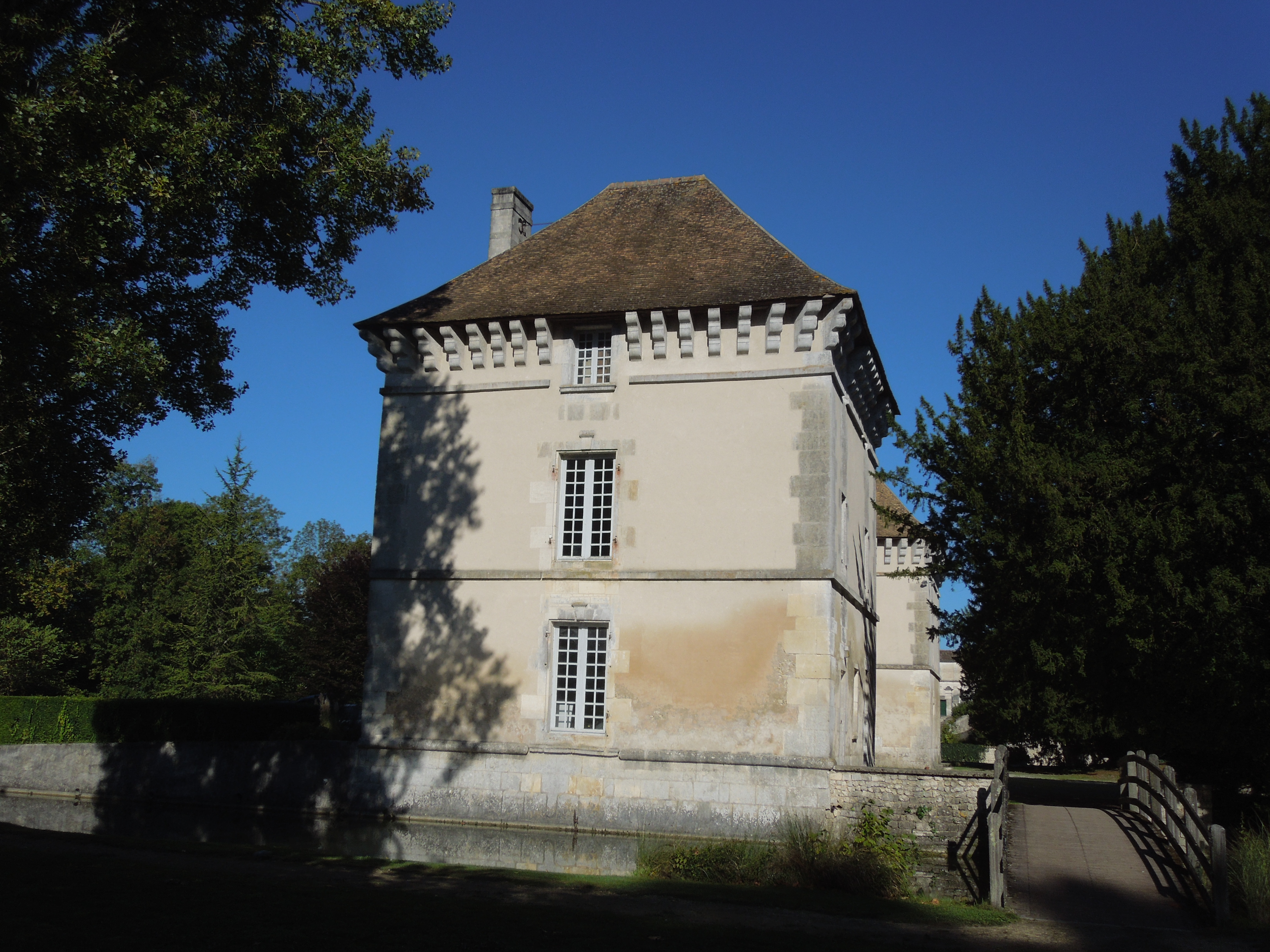 Château de Lignières in Lignières-Sonneville, der Südpavillon gesehen von Süden